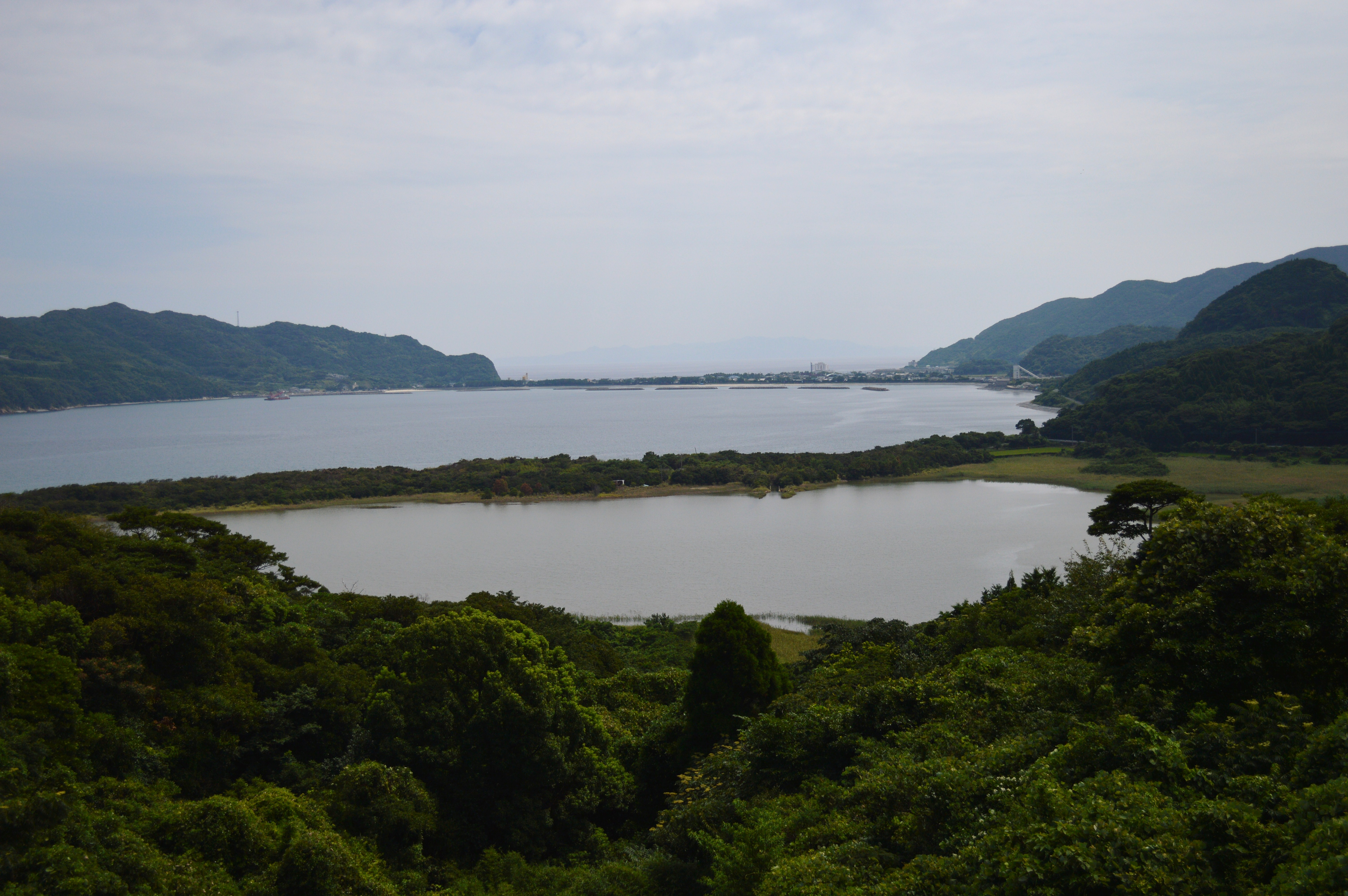 鹿児島県薩摩川内市の上甑島、手前は須口池で中央が東シナ海、その奥は里集落